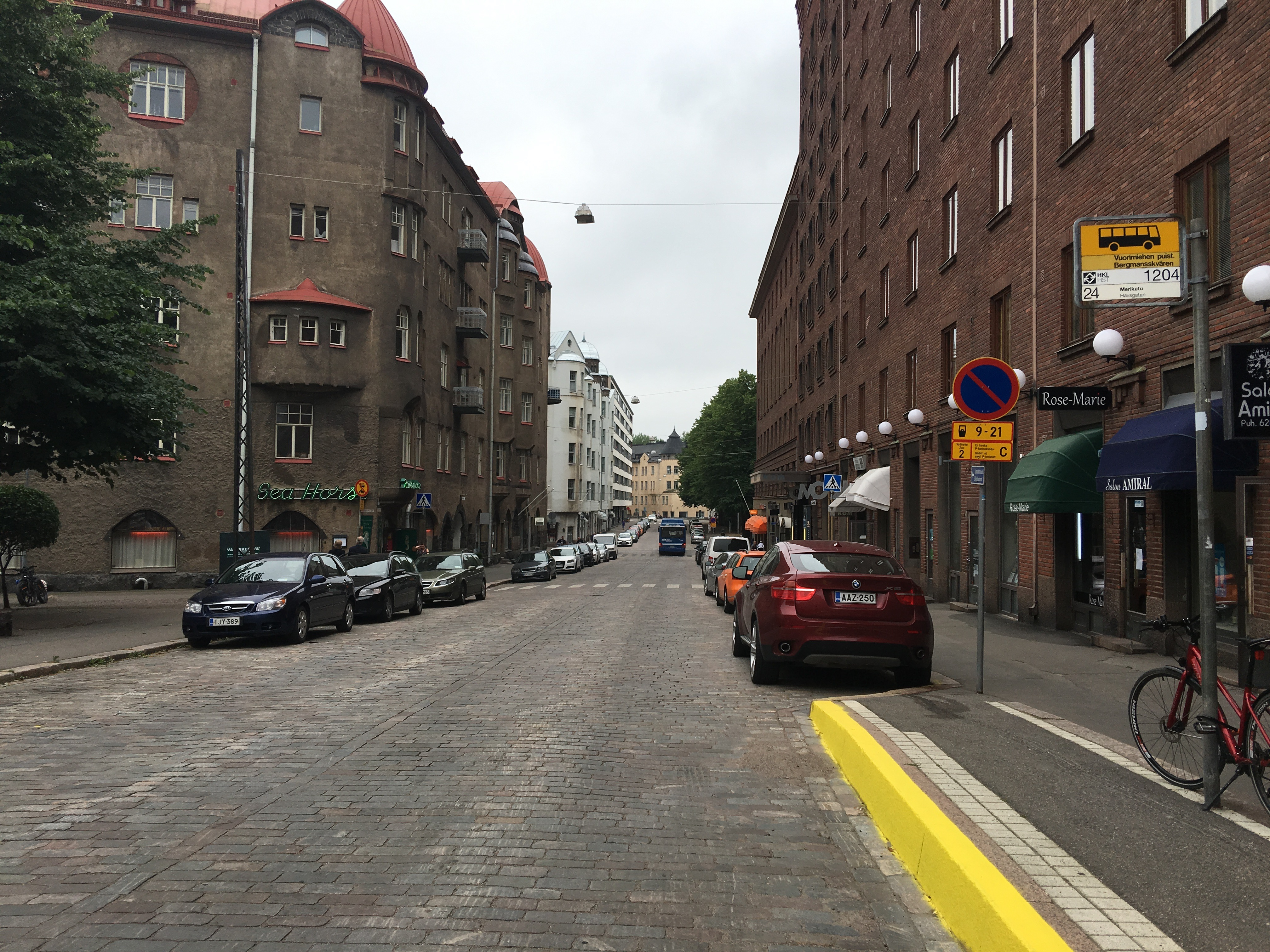 Kapteeninkatu Helsingin Ullanlinnassa heinäkuussa 2016 kuvattuna Vuorimiehenkadulta.